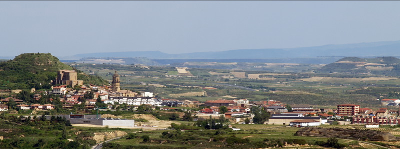 Bastidako ikuspegi panoramikoa.